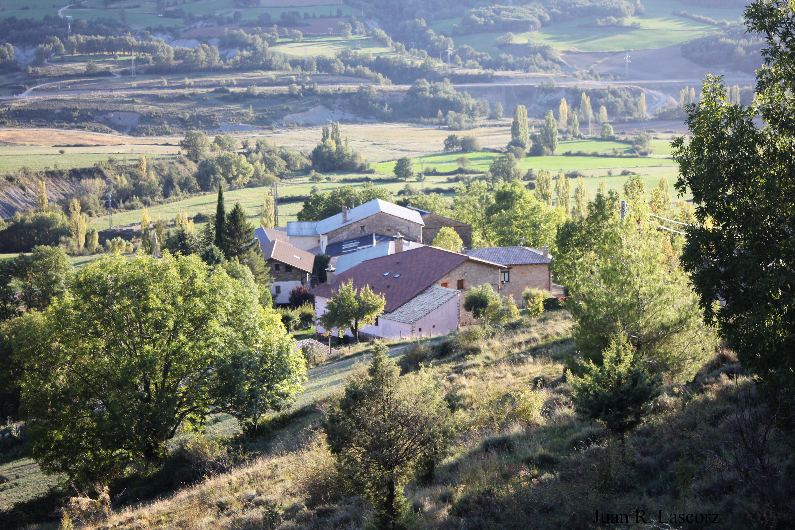 Aragonés: Barrio d'abaixo de Sarrat, en Vall de Lierp, Ribagorza, Uesca.